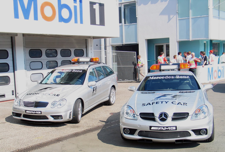 Beschreibung: Safety und Medical Car auf dem Hockenheimring 2004 Fotograf: Dirk Goldhahn Lizenzstatus